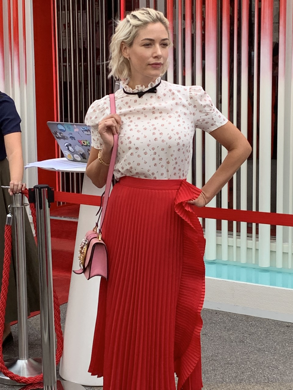 Sarah Felberbaum Venezia 2019